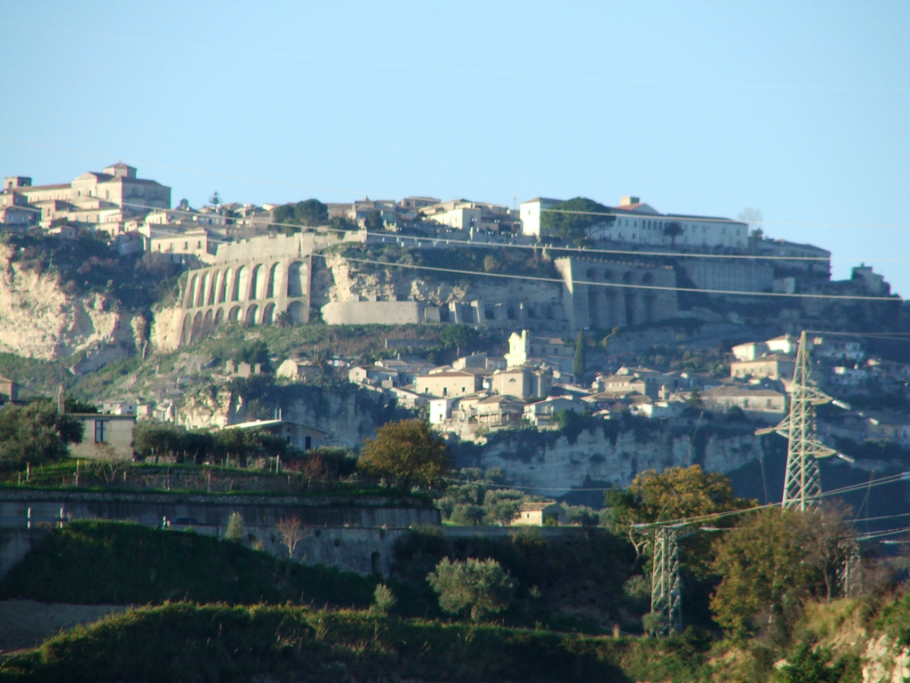 Gerace vista da Locri Gerace view from Locri